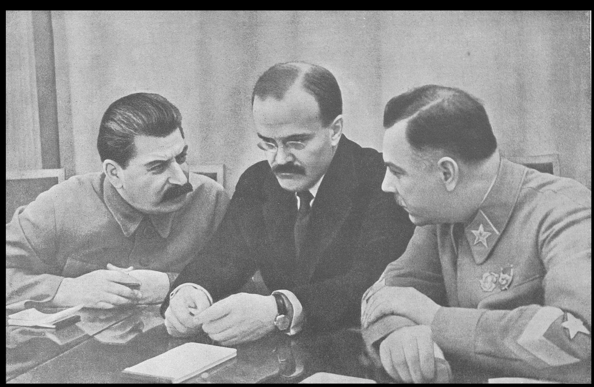 СССР, 1937 г., лидеры, обсуждение. В Альбоме описание к фотографии отсутствует.